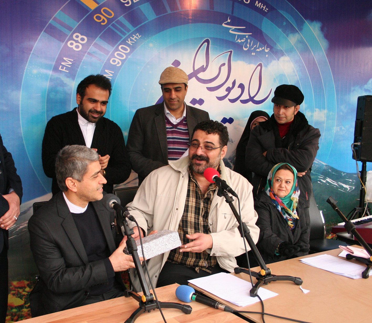 حضور وزیر امور اقتصادی و دارایی در روز 22 بهمن- غرفه رادیو ایران وبرنامه کوی نشاط